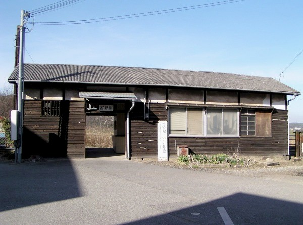 石野駅 2006年3月25日午後3時55分 (JST) ごろKouchiumiが撮影。‚